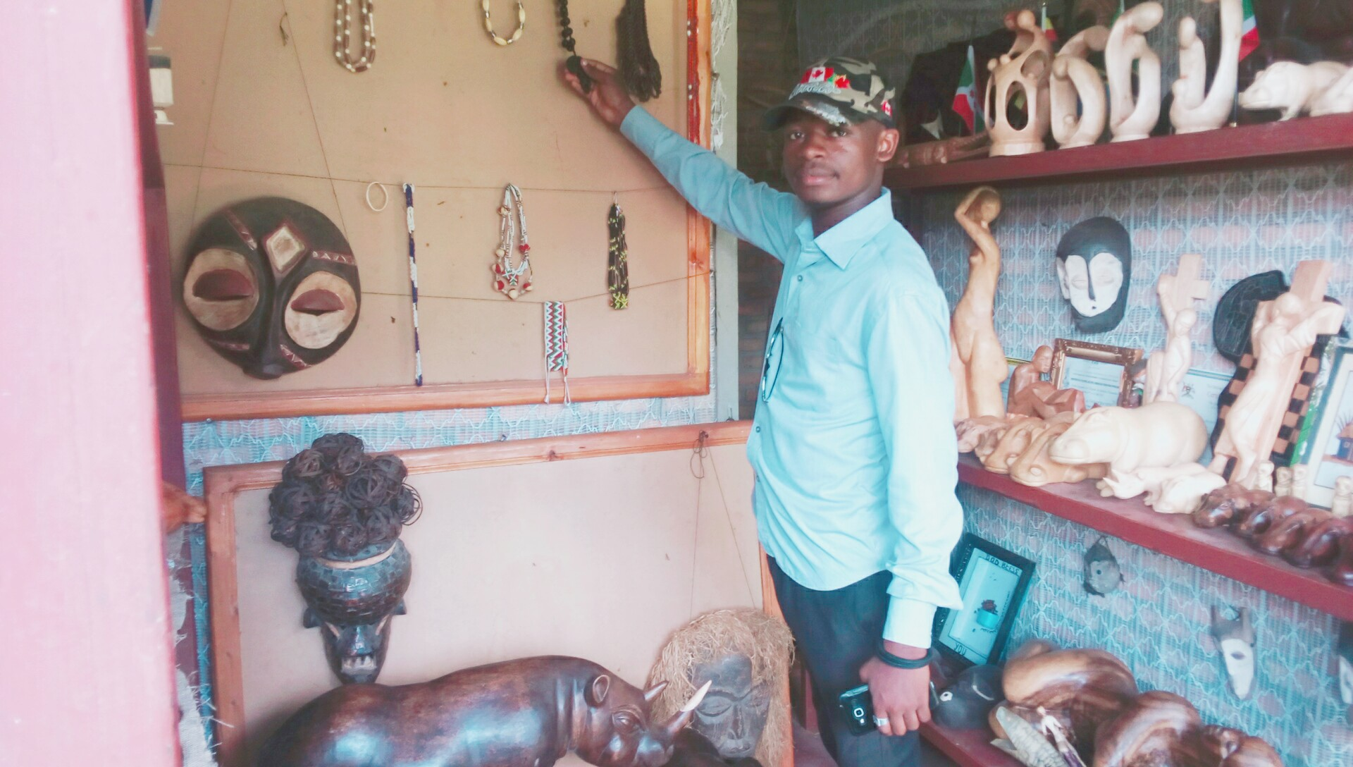 L'art Burundi This is an image of "African people at work" from Burundi